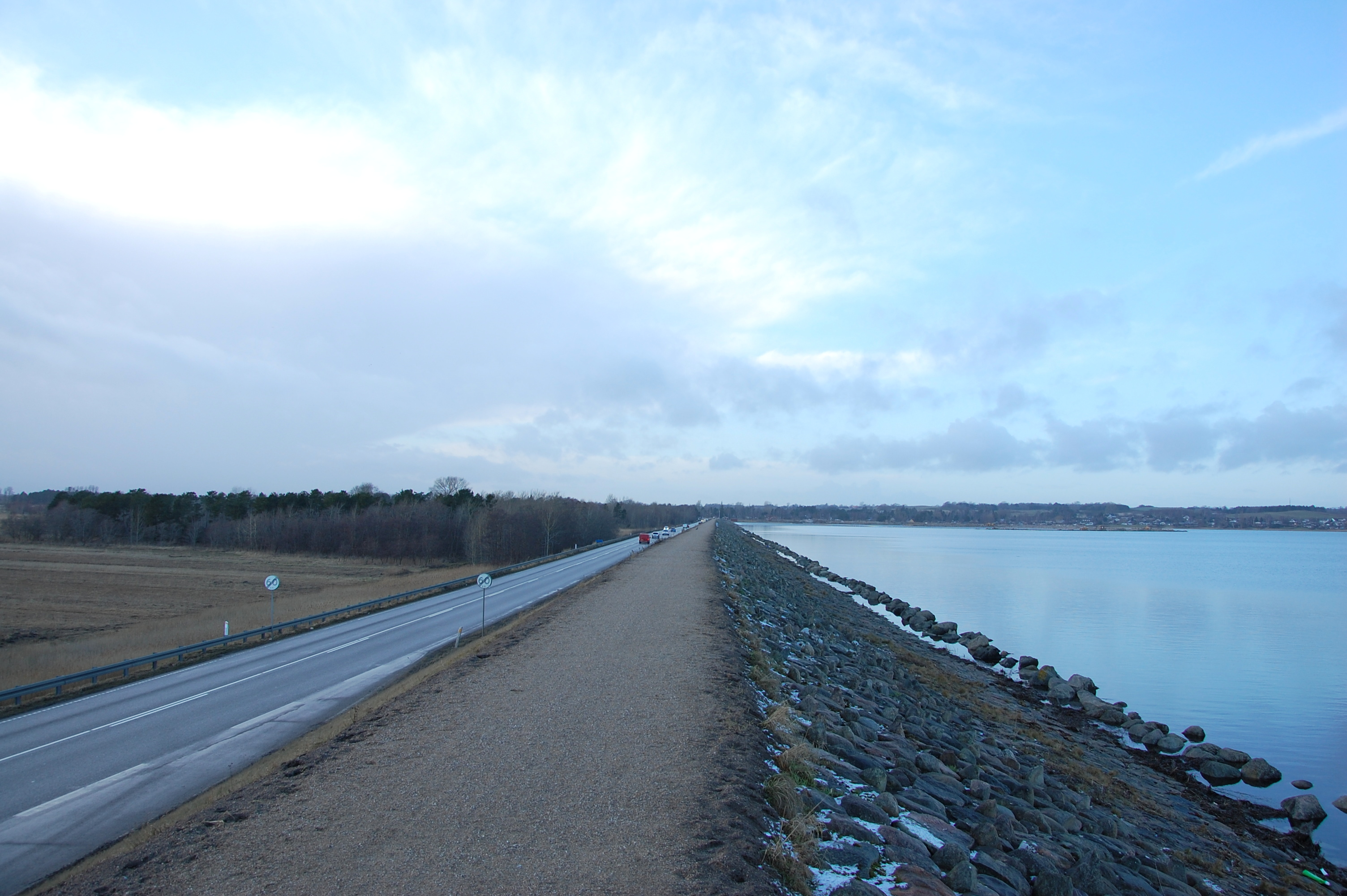 Damm von AvdeboDansk: Lammefjordsdæmningen